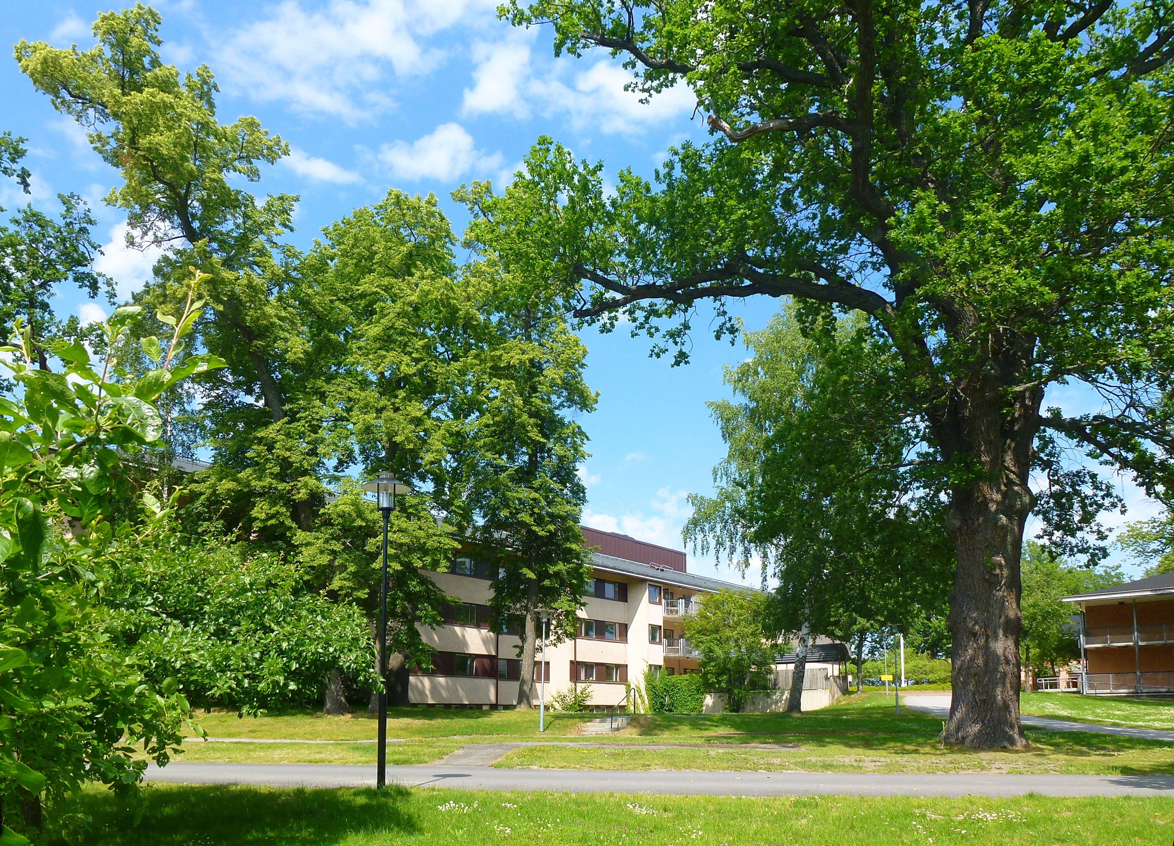 Mäktiga ekar på Stortorp